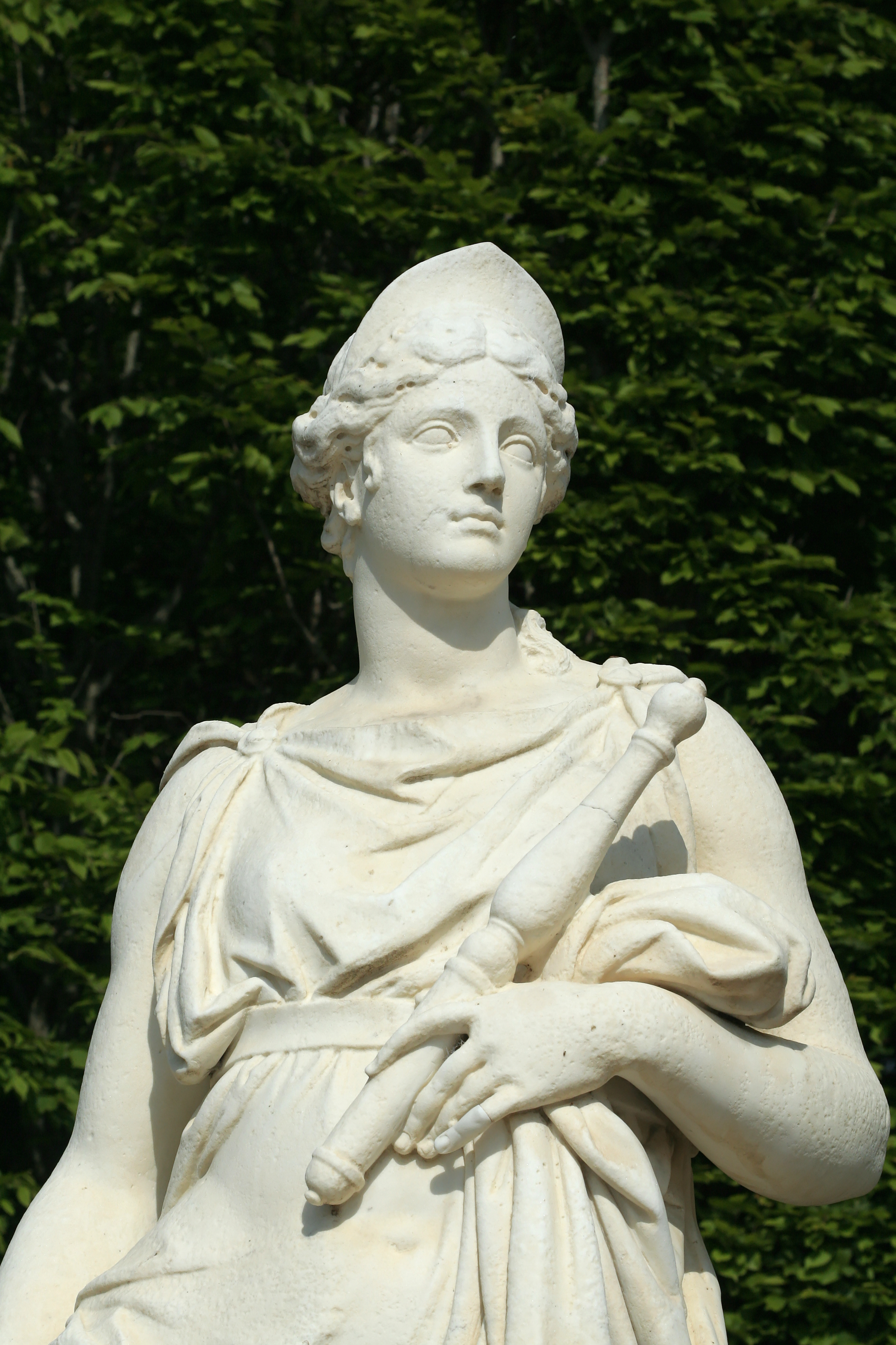 Parc de Versailles, demi-lune du bassin du Char-d'Apollon. Junon diadémée, tenant son sceptre, Jean-Jacques Clérion, 1686-1687, h. 2.7 m, marbre. inv1850n°9153